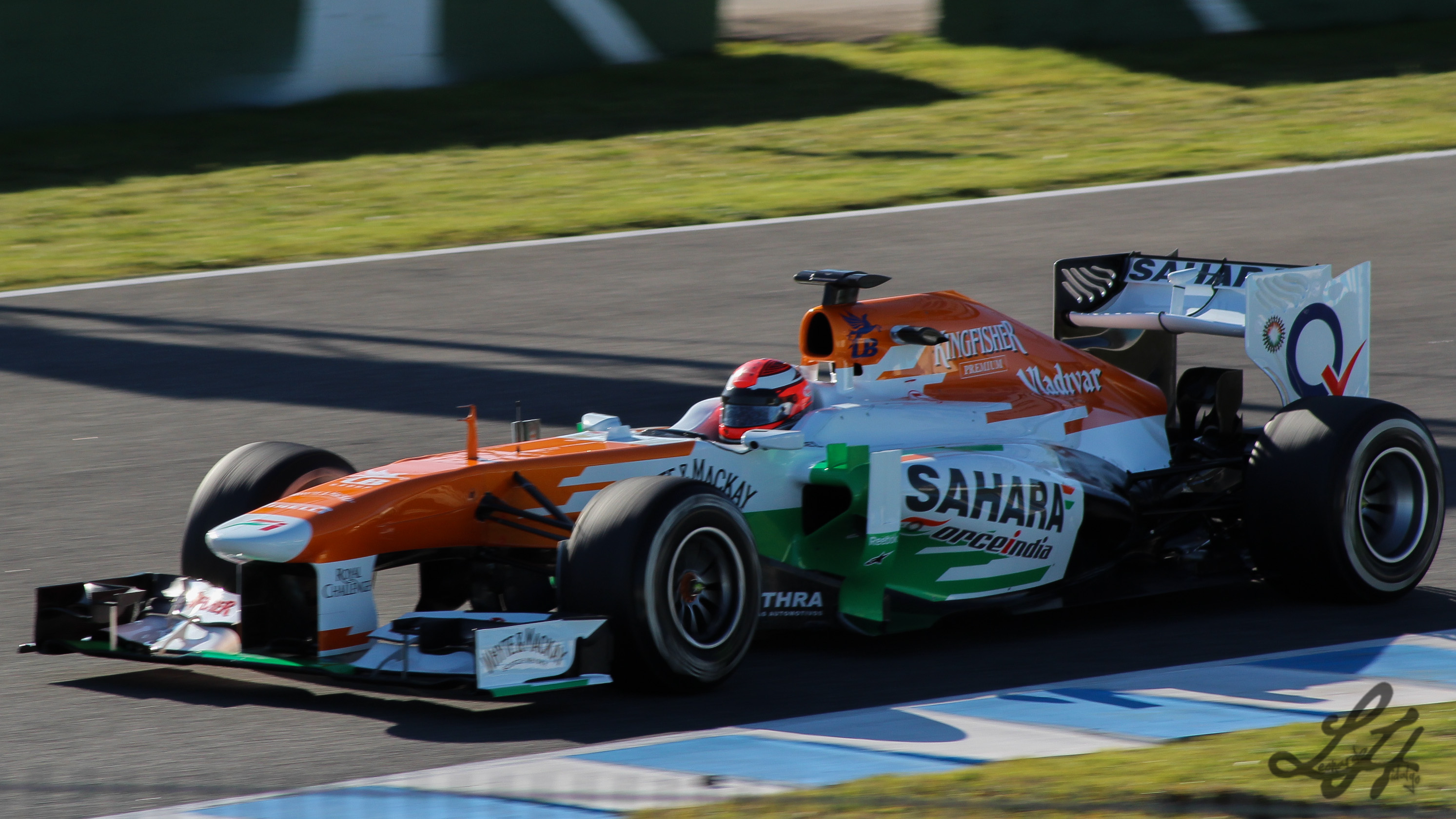 Fotos hechas el 7 de Febrero de 2013 en el circuito de Jerez, plena pre-temporada de F1. Would you like to follow me on Instagram and Twitter?